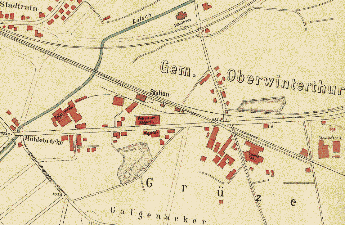 «Uebersichtsplan der Stadt Winterthur mit Ausgemeinden von 1904»; Ausschnitt Quartier Grüze.